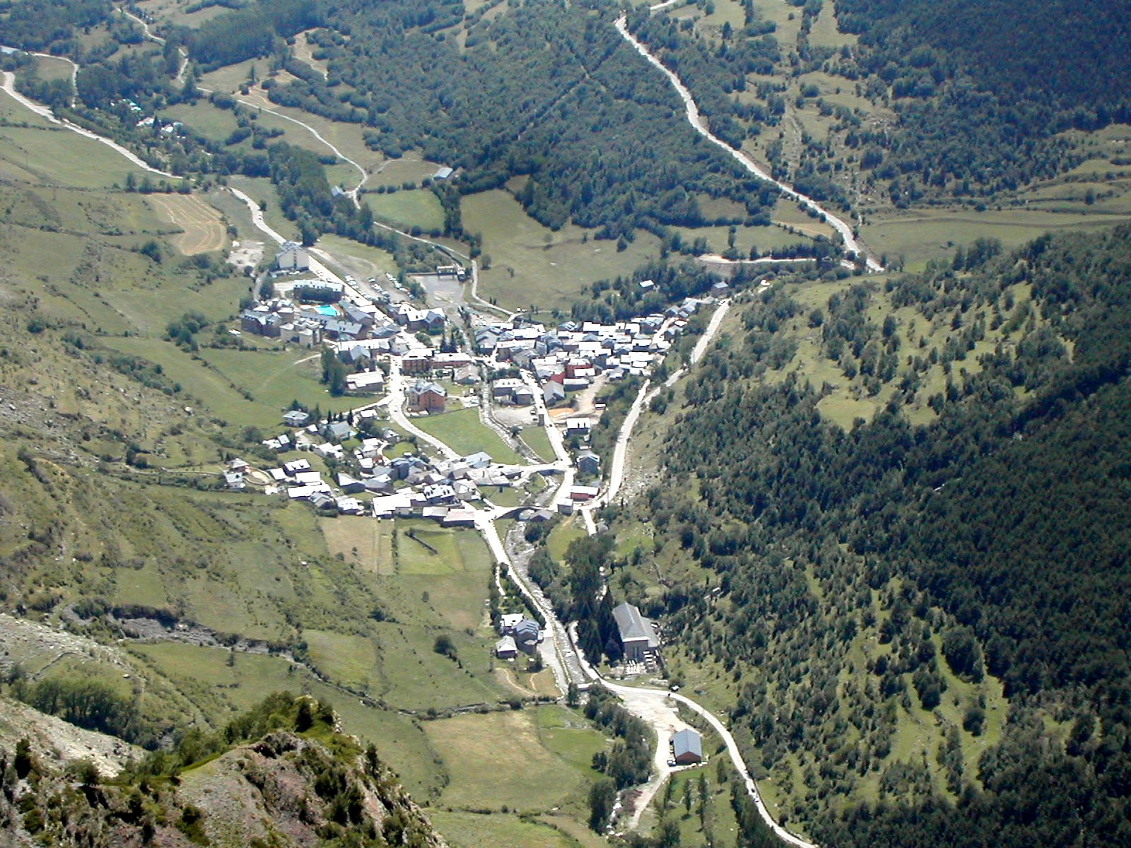 Village of Espot (Catalonia)